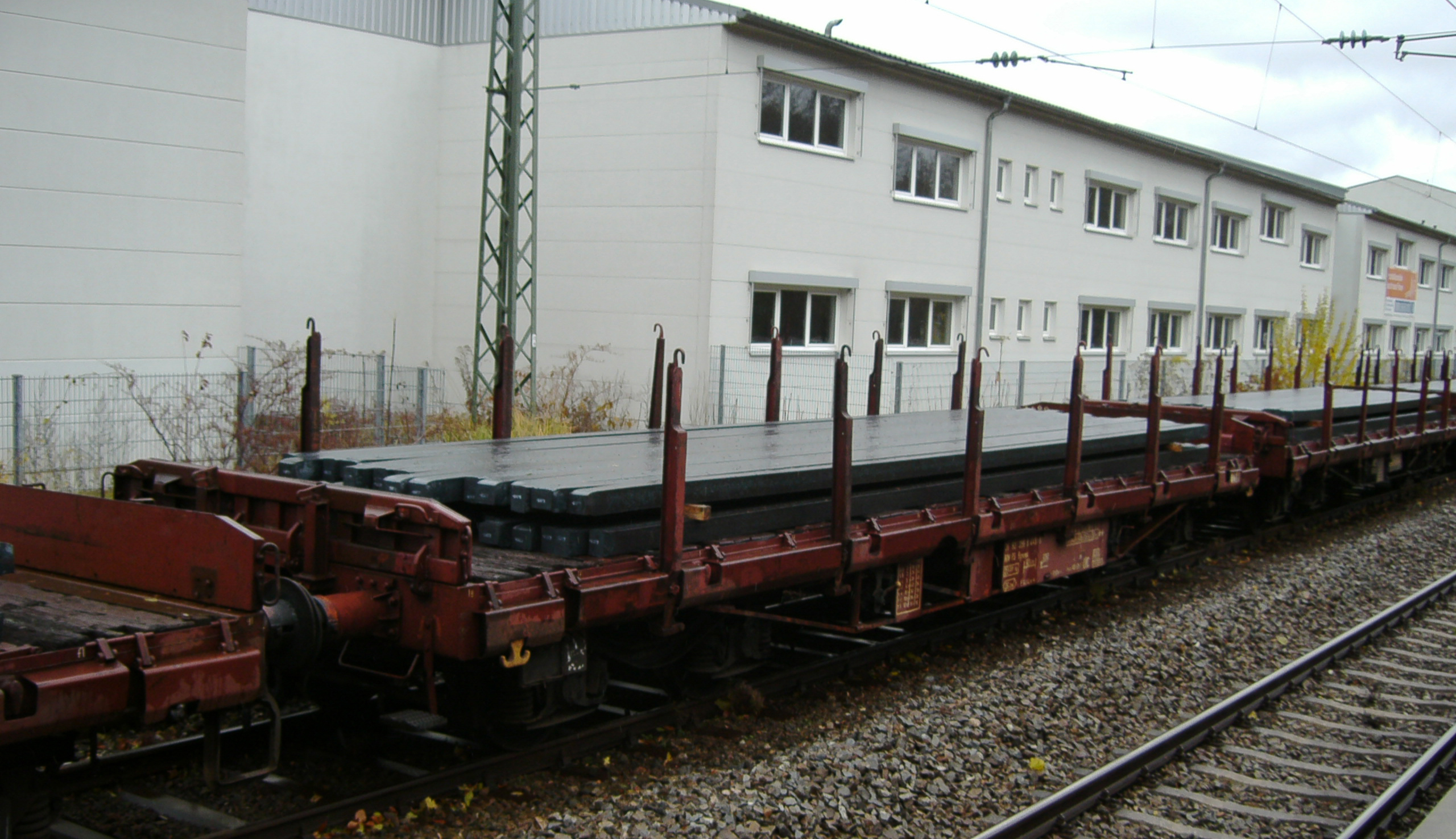 Vierachsiger Flachwagen der Regelbauart, Gattung Rgmms, Eigentümer: Trenitalia; aufgenommen im Bahnhof Fürstenfeldbruck